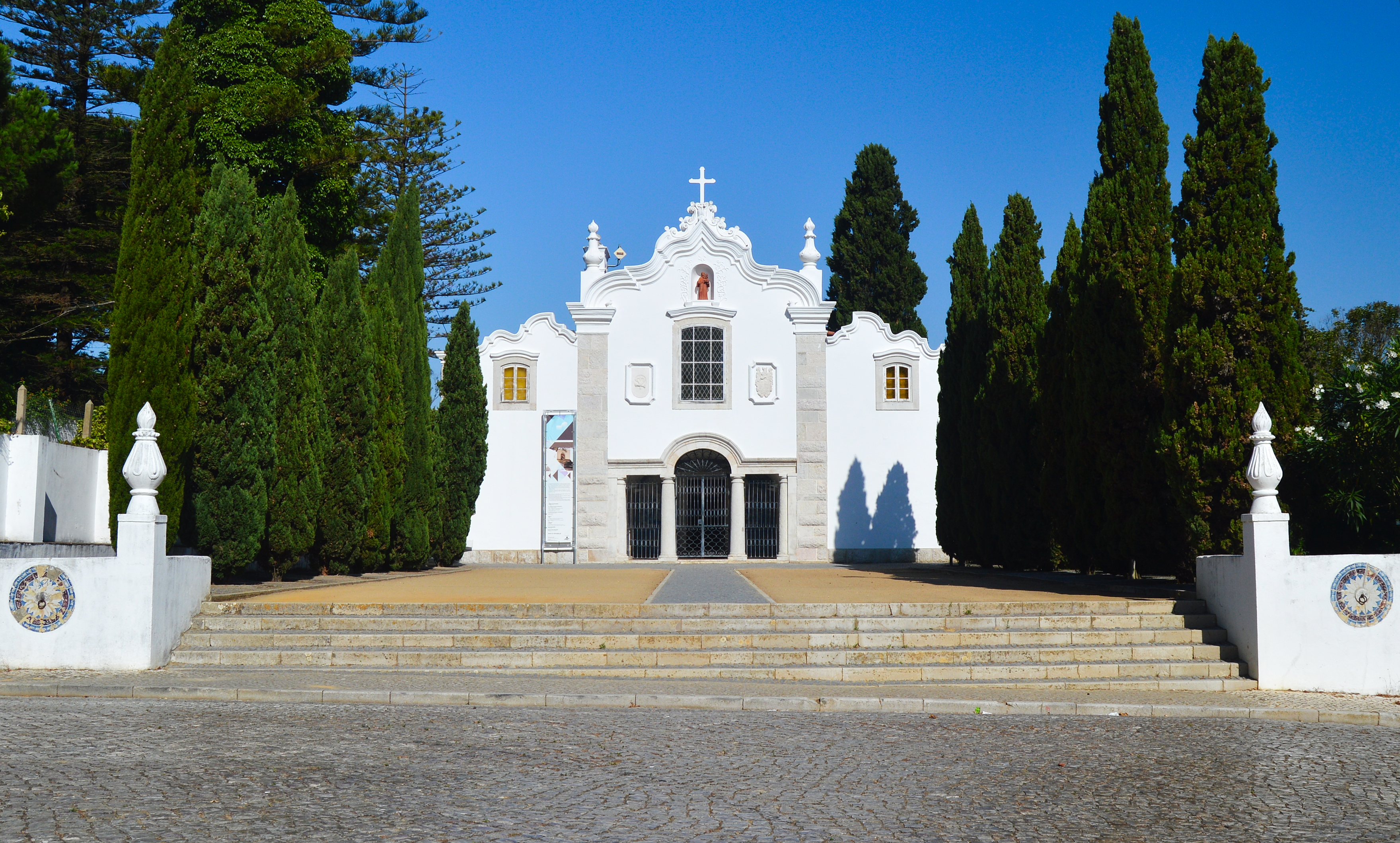 Convento dos Capuchos, Costa de Caparica, Almada, Portugal